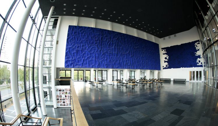 Yves Klein. Schwammrelief.